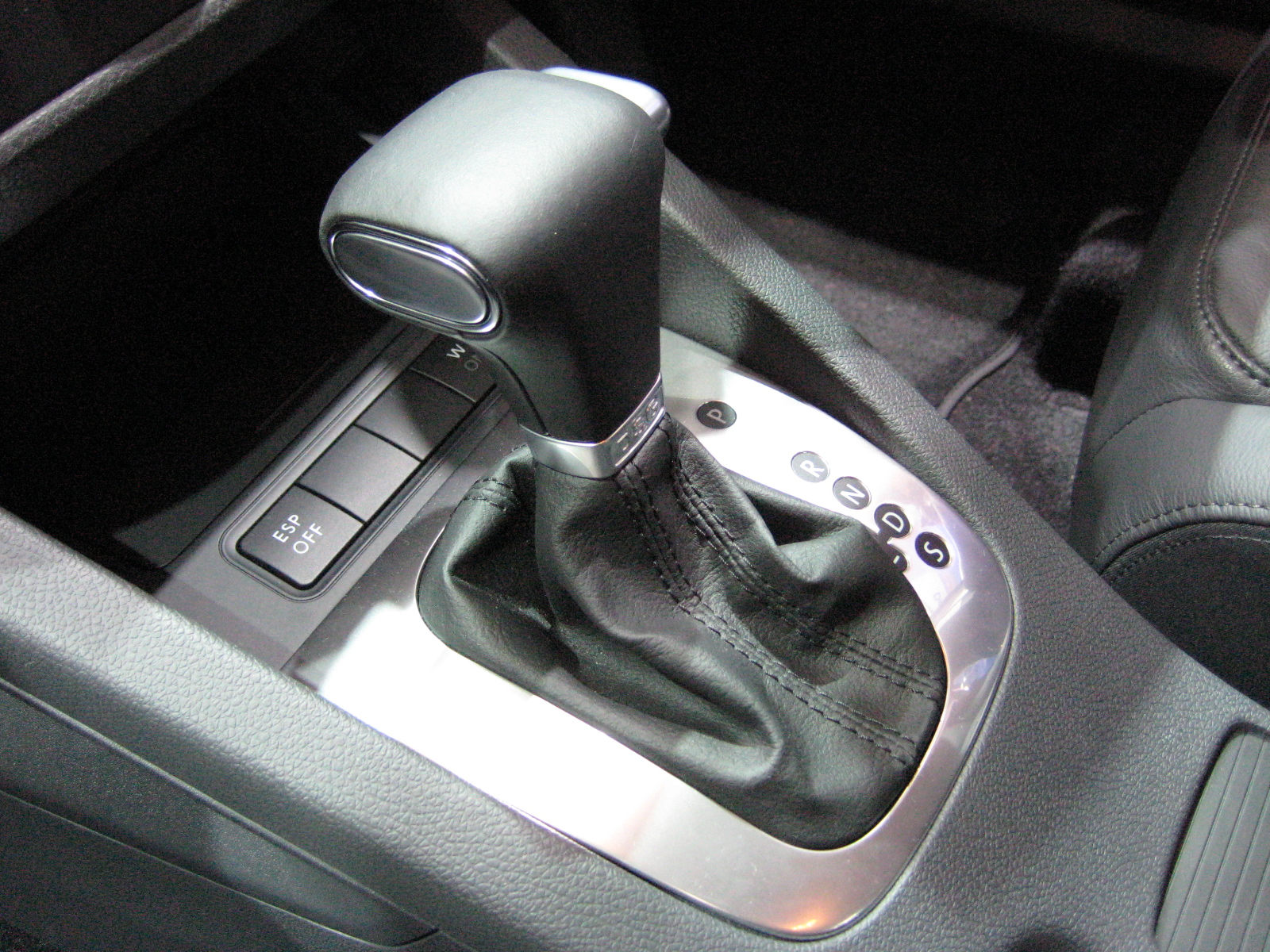 Volkswagen 6Speed DSG Transmission